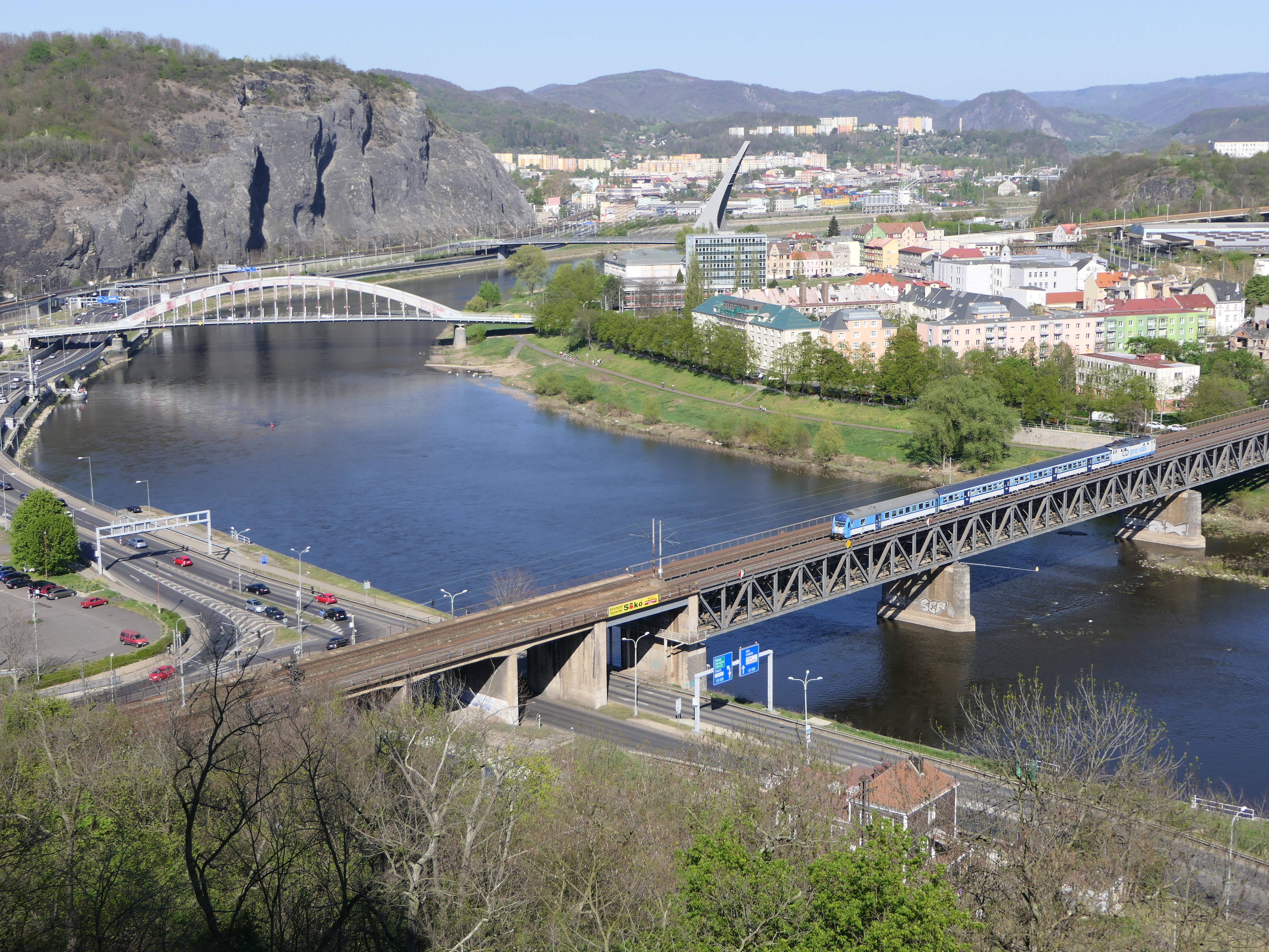 Blick auf die drei Elbbrücken von Usti nad Labem